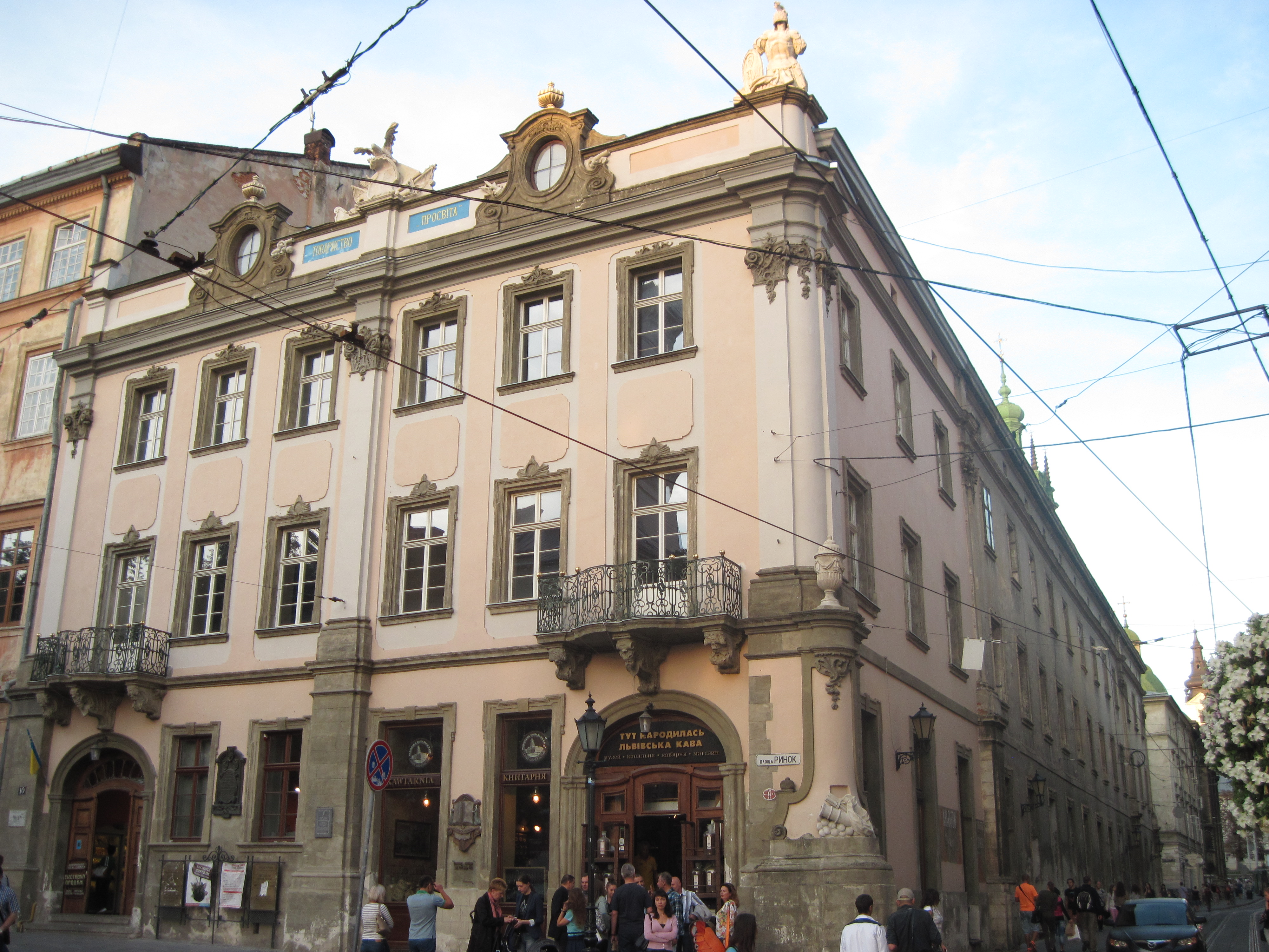 Палац С. Любомирського, Ринок, Львів, 2014